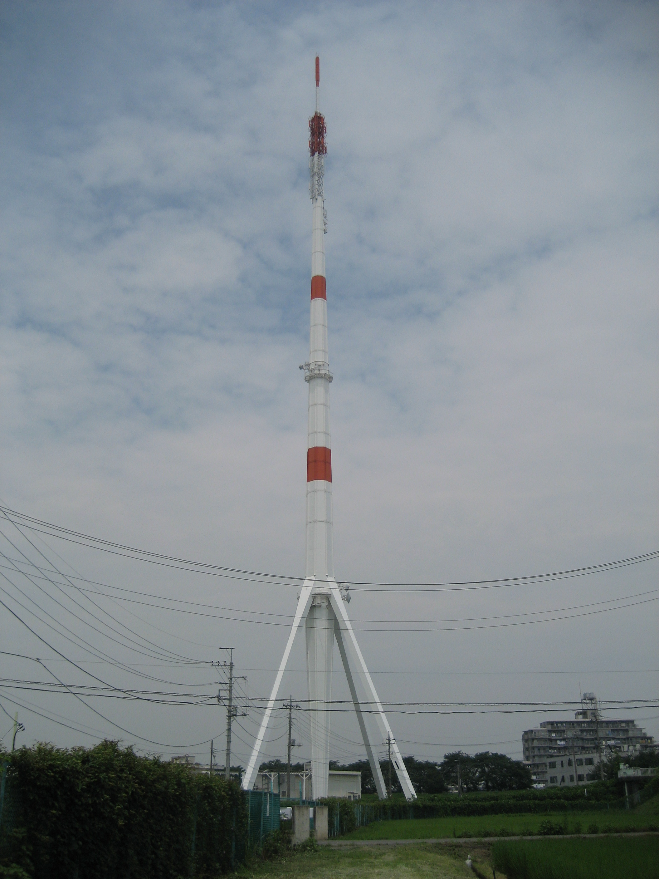 テレビ埼玉浦和送信所